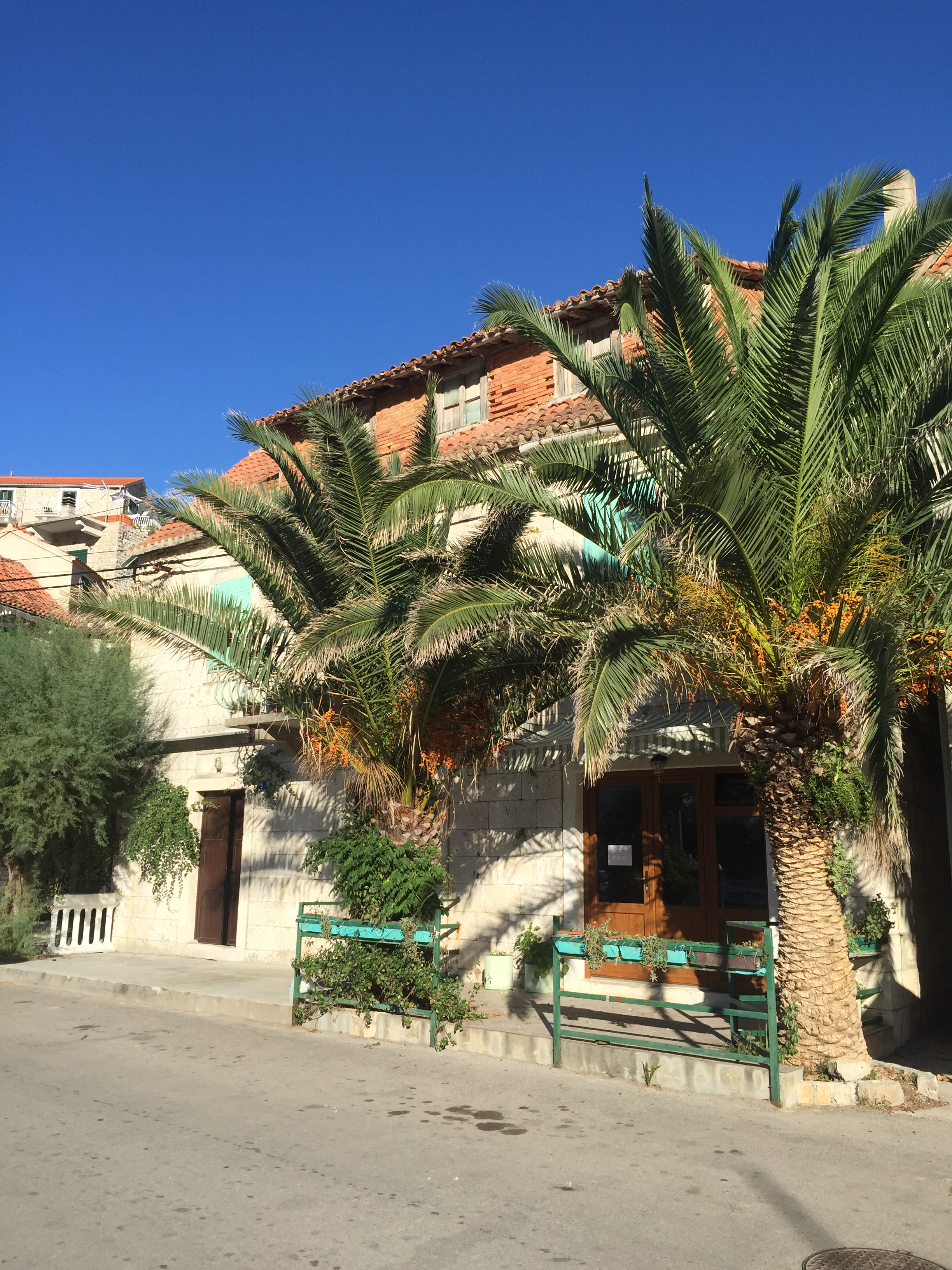 21432, Stomorska, Croatia